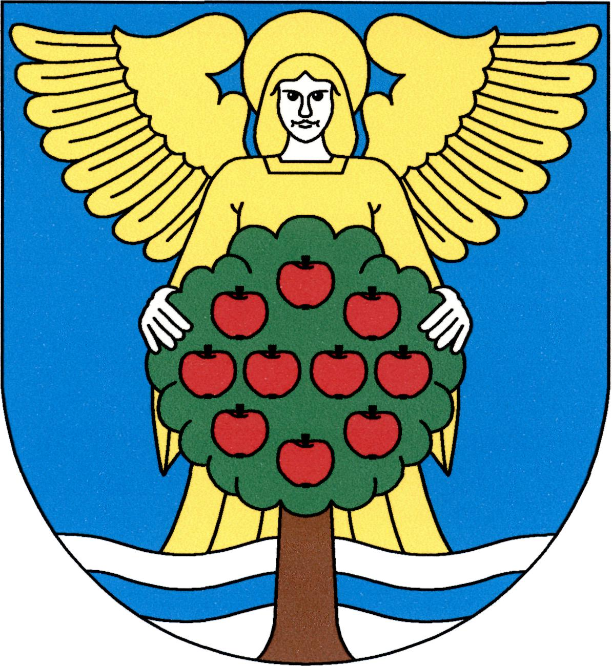 Znak obce Říkov